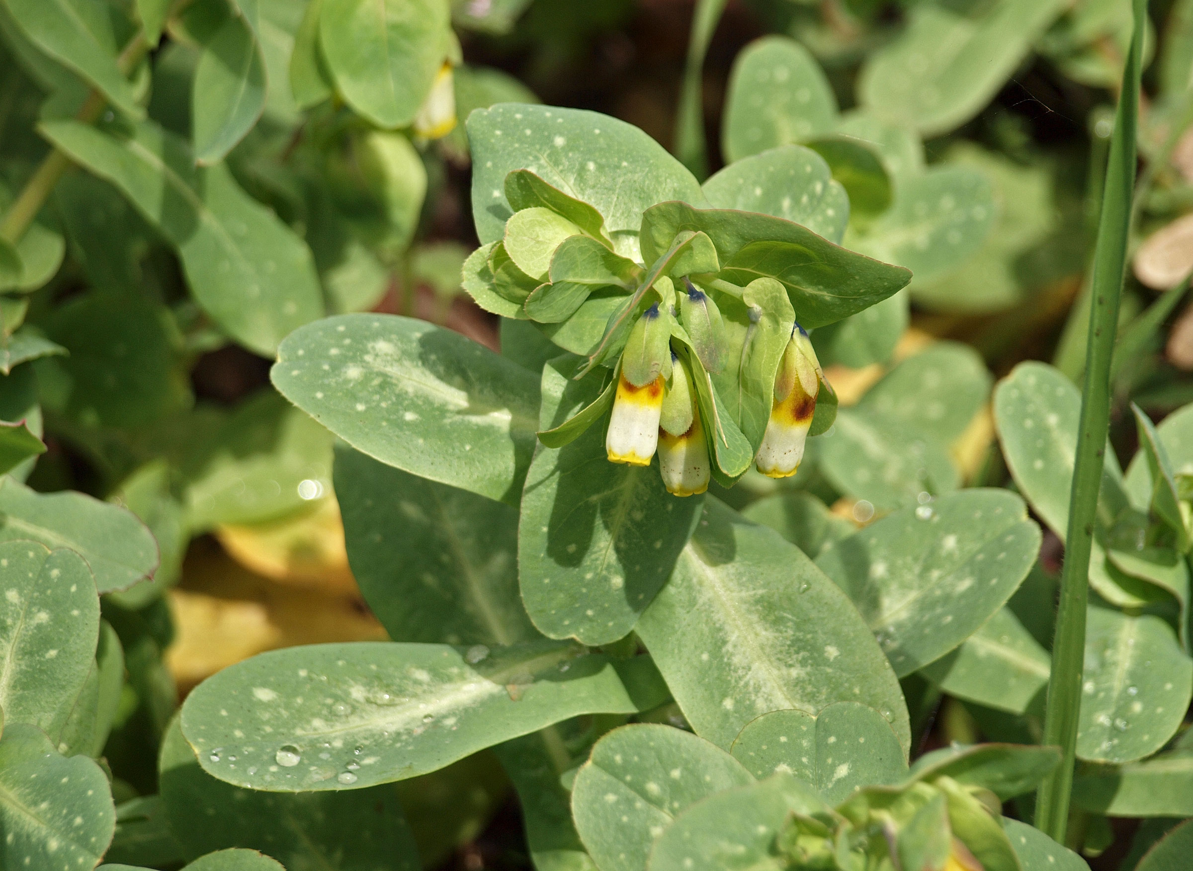 Cerinthe gymnandra, prado nitrófilo, a la sombra. Losar de la Vera (Cáceres, España).